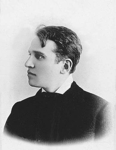 Janovics Jenő – színész, rendező, színházigazgató, színháztörténeti szakíró. A Kolozsvári Nemzeti Színházat 1905-től vezette.